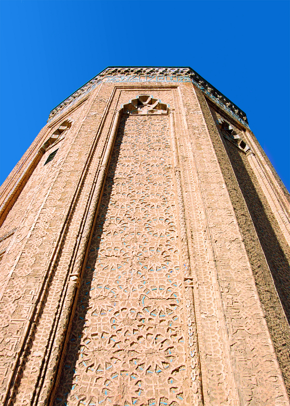 Momine Khatun Maysoleum in Nakhichevan